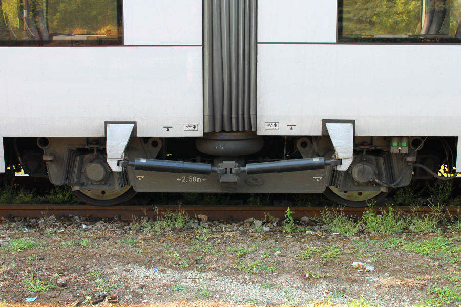 Wózek Jakobsa typu 37AN spalinowego zespołu trakcyjnego SA134-017 stojącego na bocznicy w okolicach stacji Zamość.